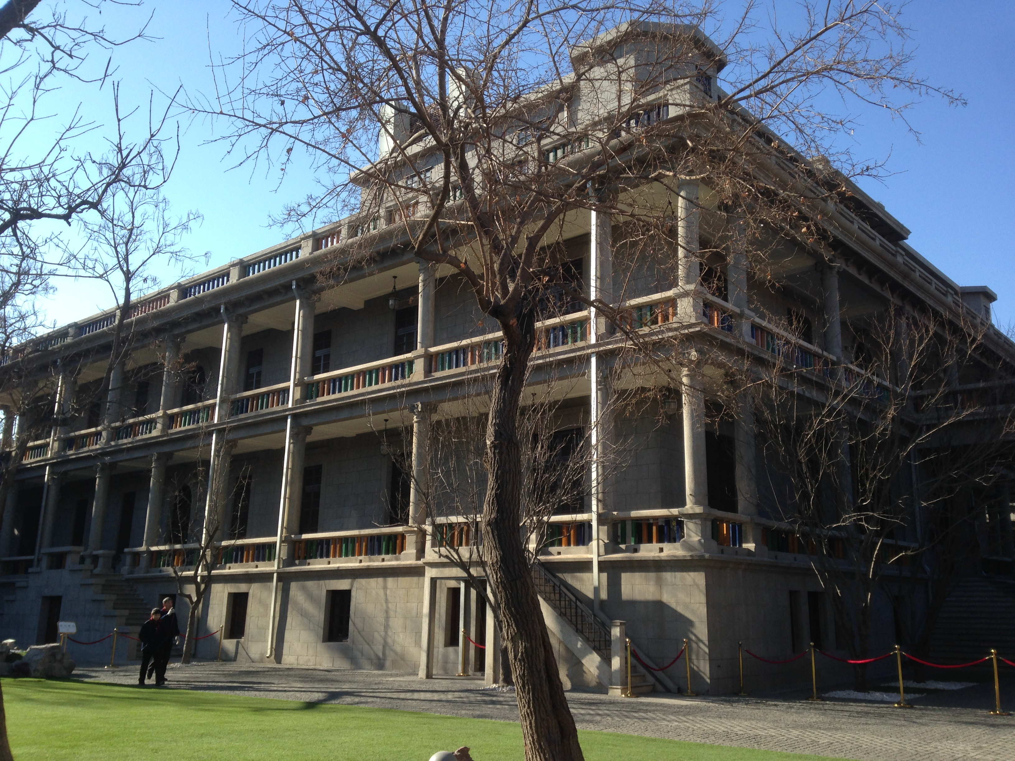 庆王府全景